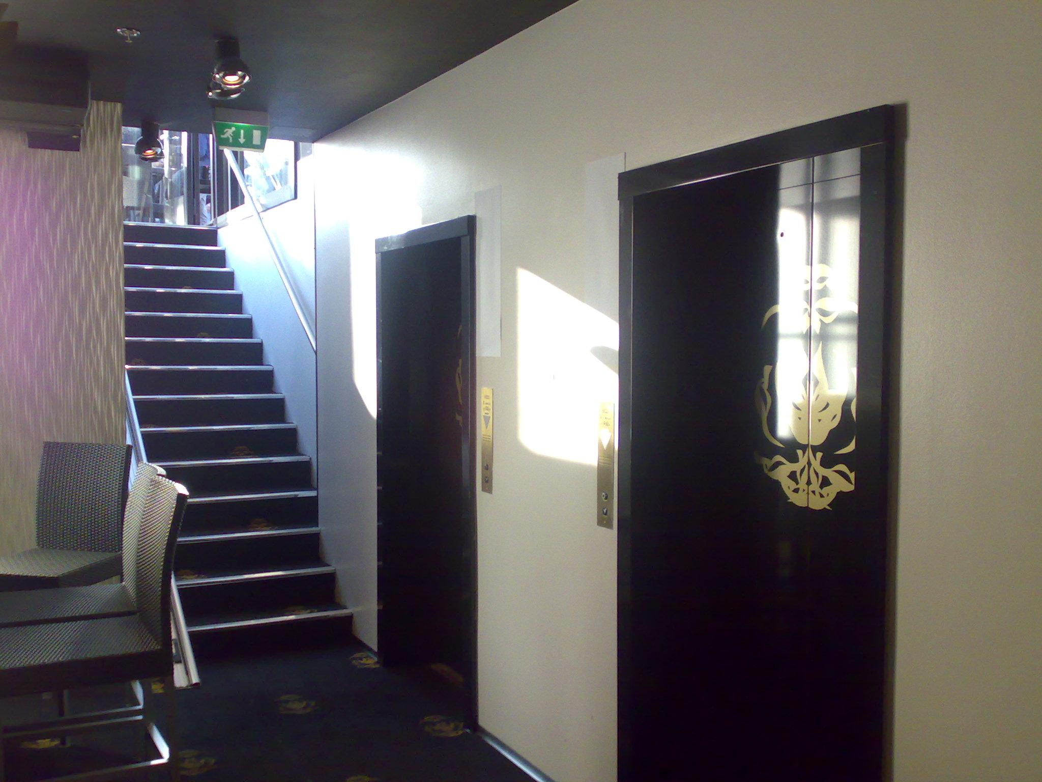 sisäänkäynti